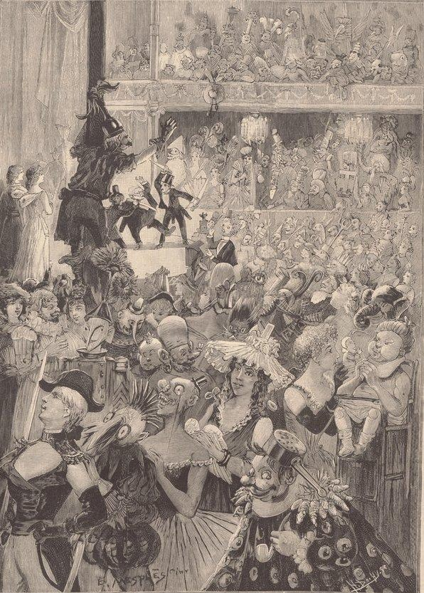 LE BAL ET LA REPRÉSENTATION DES INCOHÉRENTS DANS LA SALLE DES FOLIES BERGÈRE. (Dessin de M. MESPLÈS.)